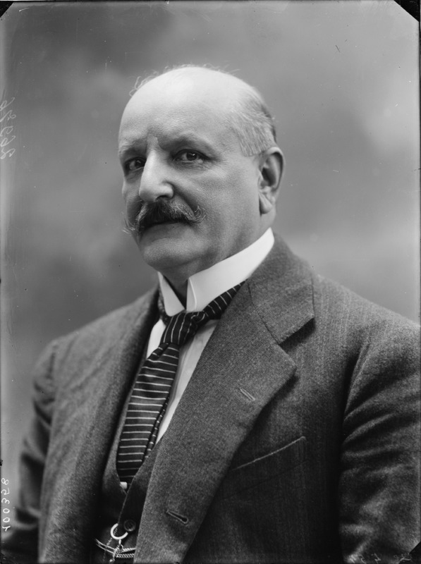 Arturo Vecchini fotografato da Mario Nunes Vais